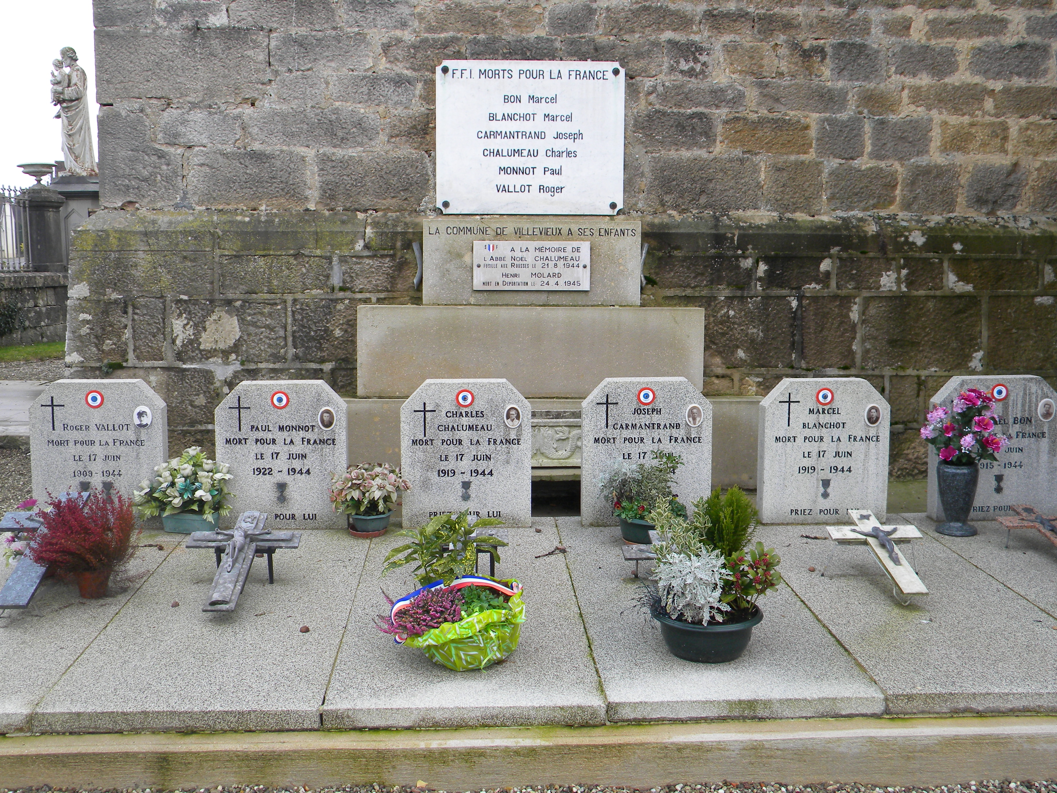 Tomboj de partizanoj de Villevieux